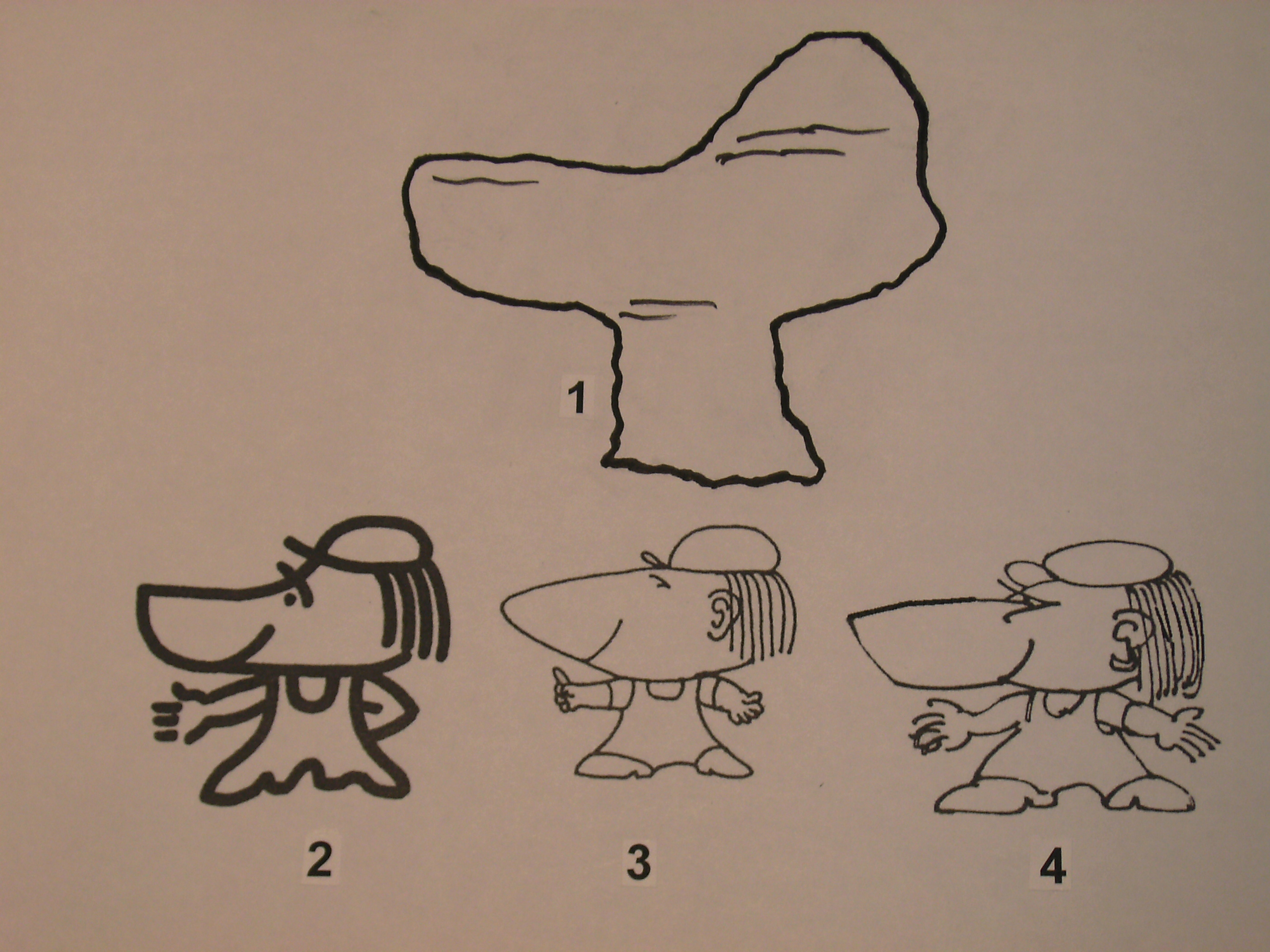 Ingo (Werbefigur für St. Ingbert): Entwicklungsschritte aus dem Stiefel